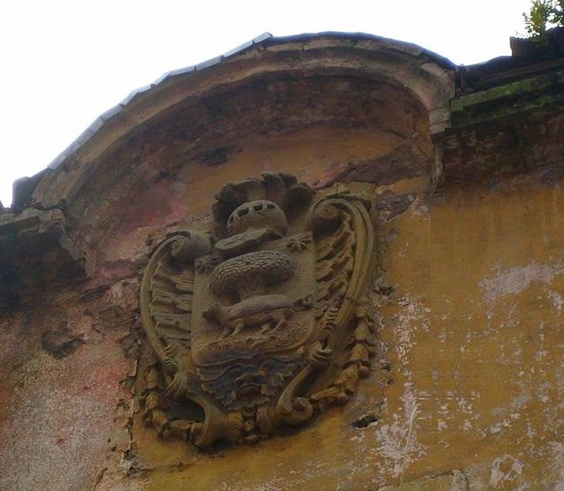 blason en pierre sur façade de maison basque dans la rue Zigordia à Zarautz (Espagne)